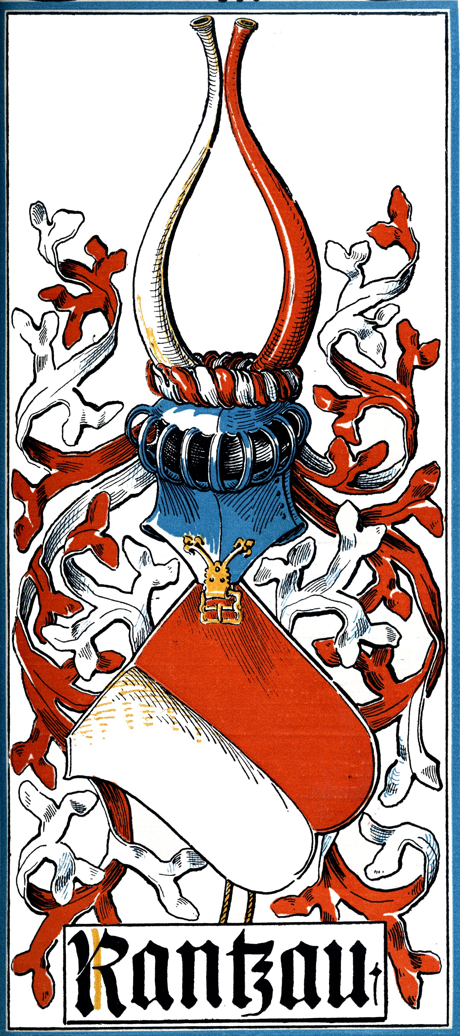 Wappen derer von Rantzau